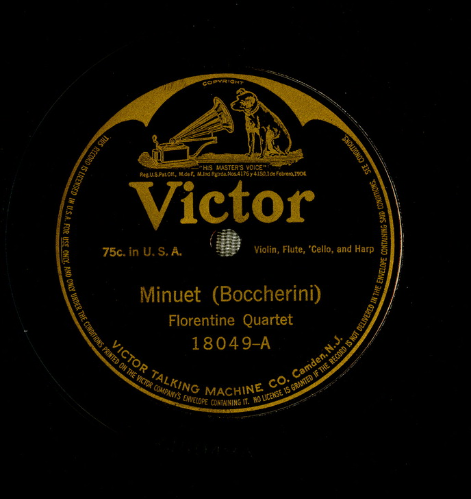 Menuet de Boccherini pour violon, flûte, violoncelle et harpe par le Florentine Quartet (1915).